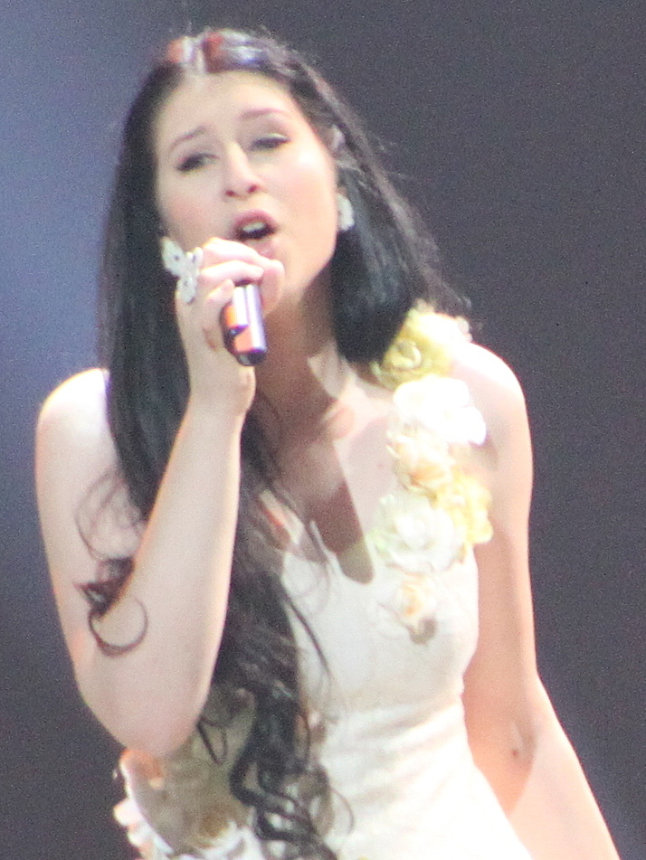 Eva Boto